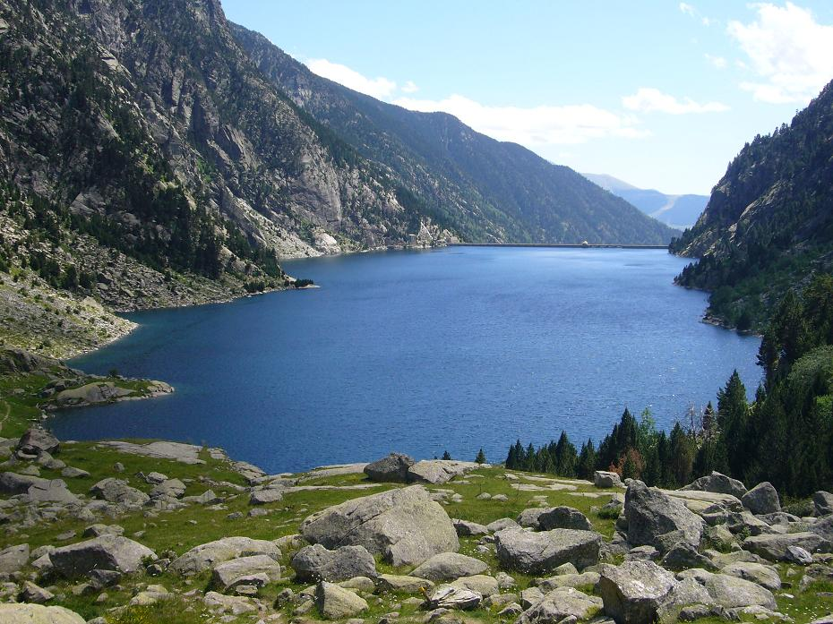 Embassament de Cavallers, vist des del nord; la Vall de Boí, Alta Ribagorça, Catalunya